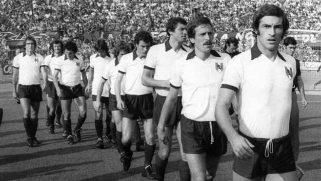 Il Torino della stagione 1976-77 scende in campo indossando la sua tradizionale seconda divisa, composta da maglia bianca e calzoncini granata. In primo piano si riconosce il capitano della squadra, Paolino "Paolo" Pulici, seguito da Renato Zaccarelli; all'estrema sinistra, Francesco Graziani.